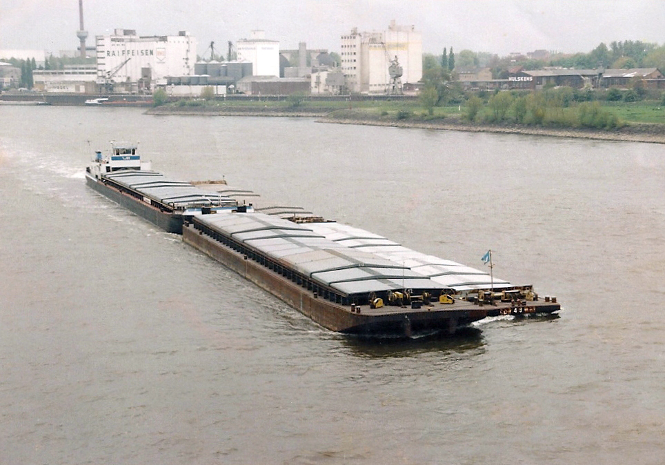 Reuterweg